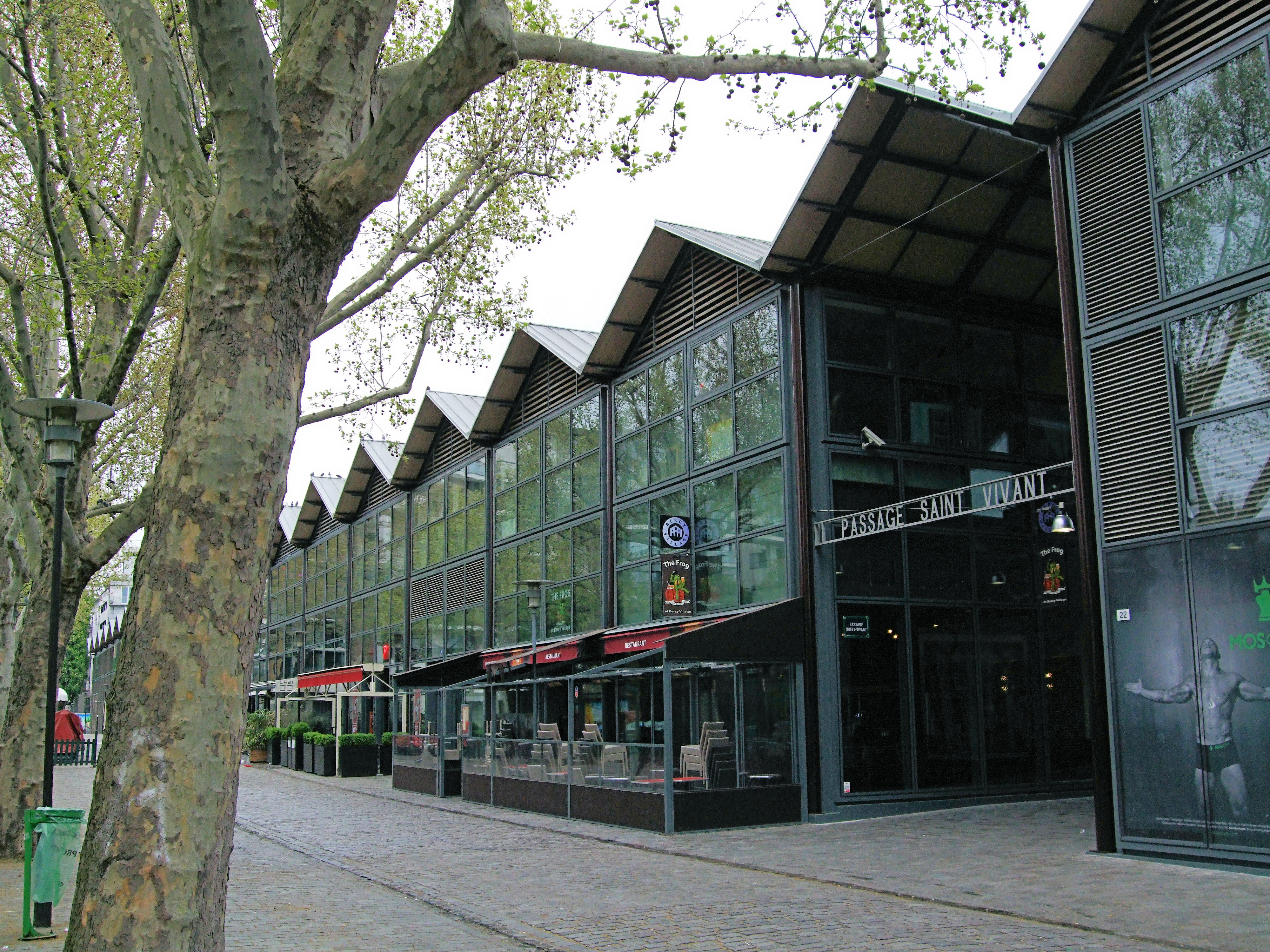 Paris (Île-de-France, France) : Le Passage Saint-Vivant vu depuis la rue François-Truffaut.